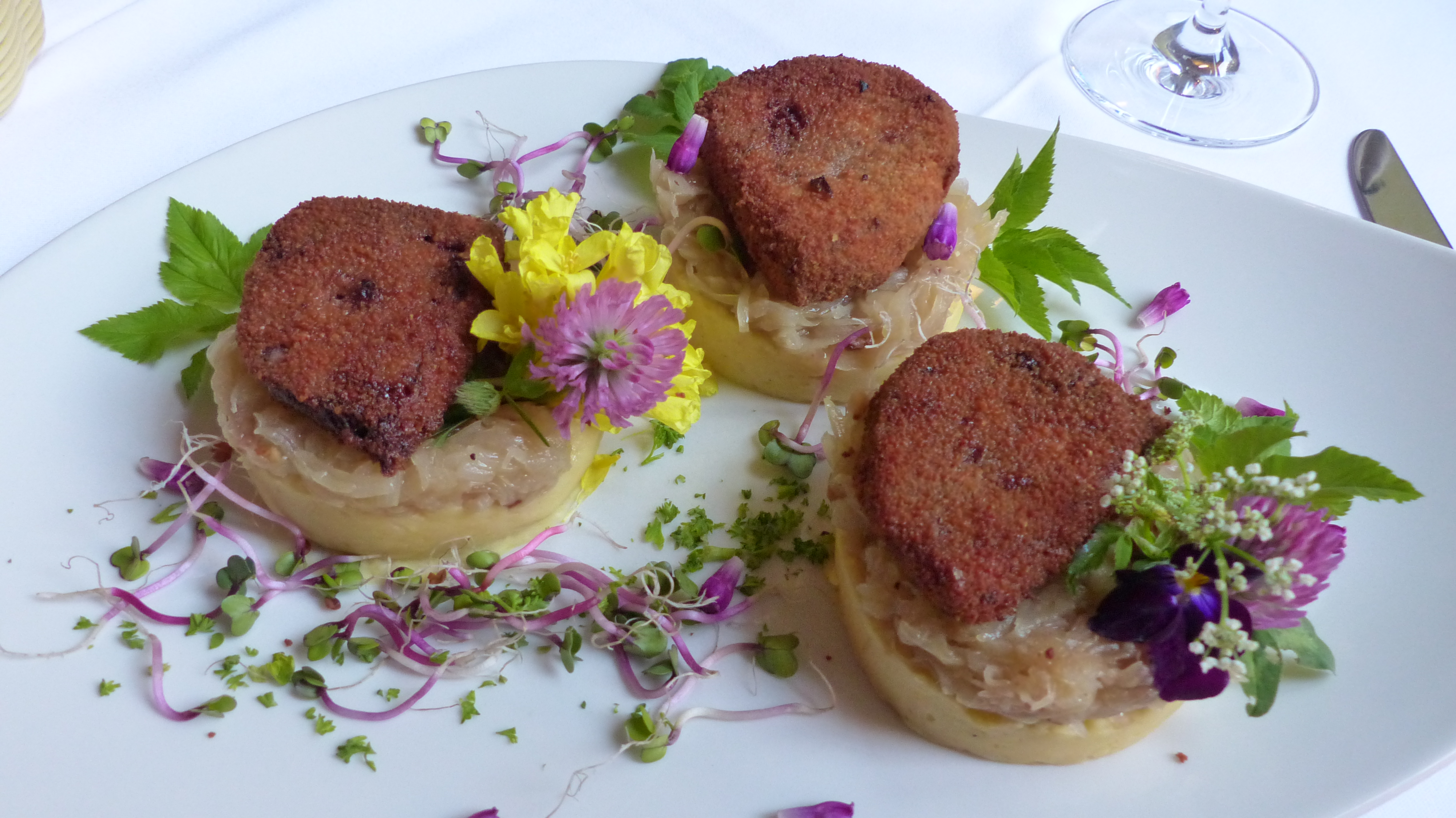 "Himmel & Erde", Erbspüree, Sauerkraut und Blutwurst; Restaurant "Kanzlei", Dresden-Striesen